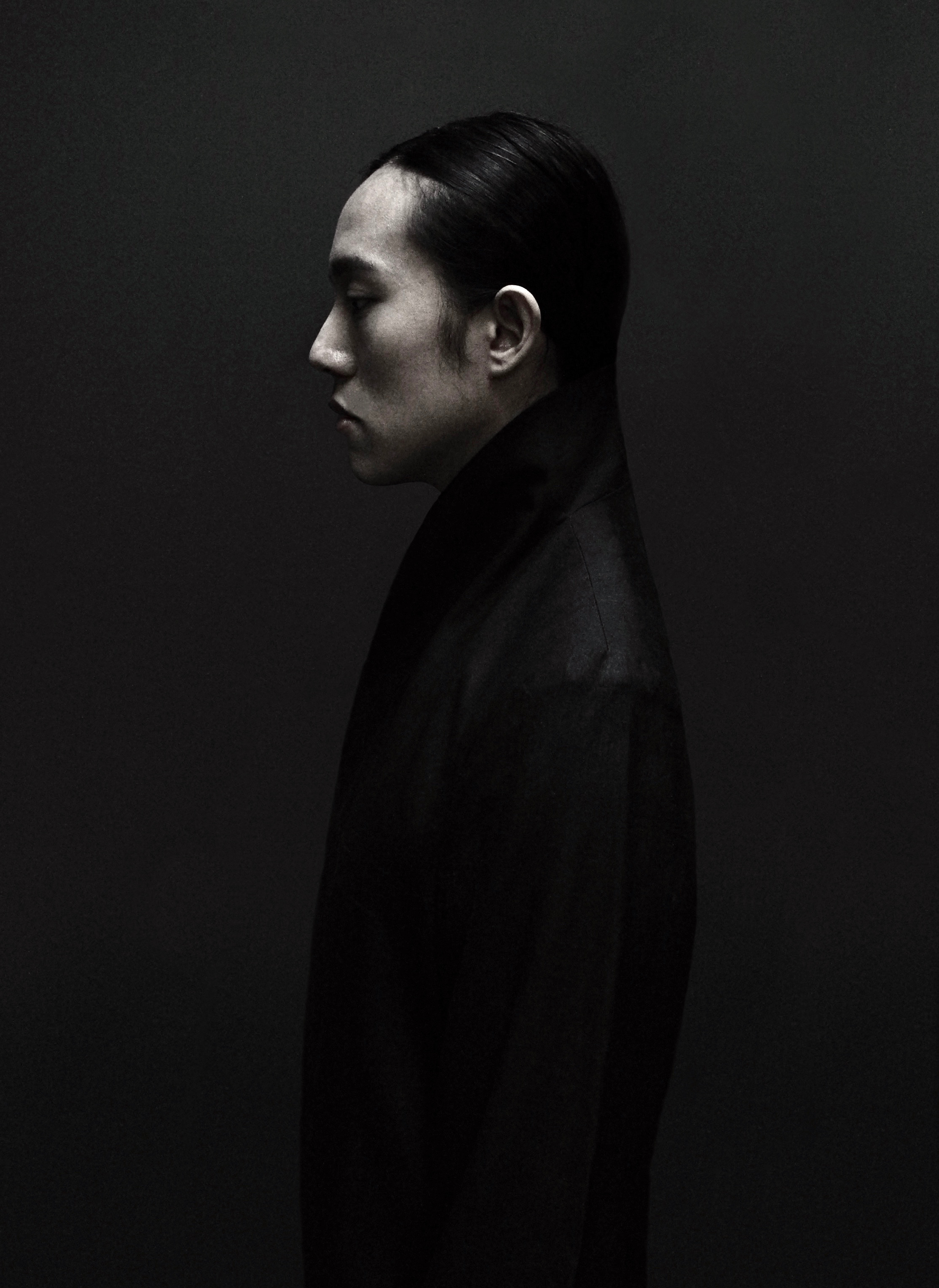 邱比肖像照